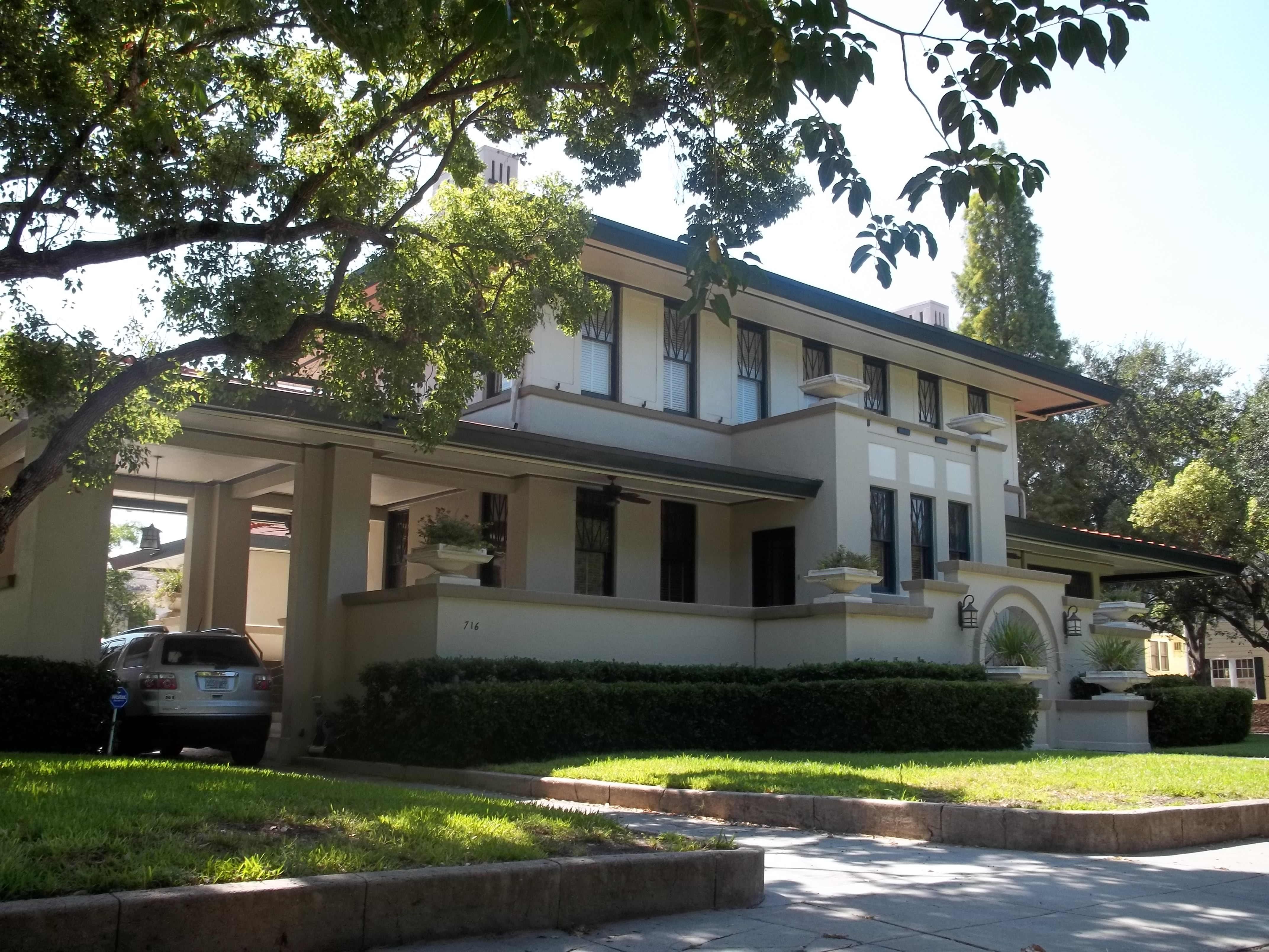 Tampa, Florida: Leiman House